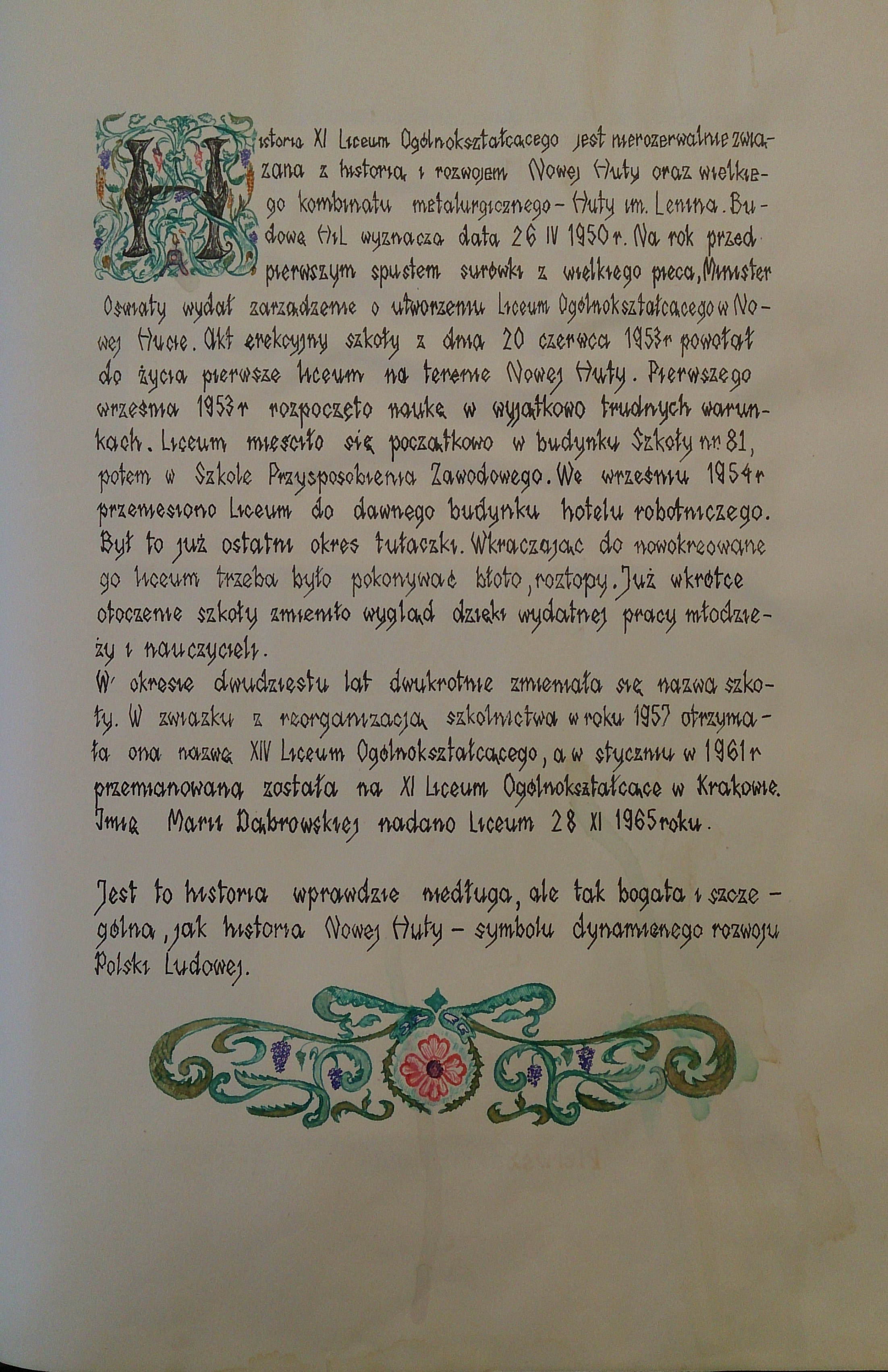 hjadschsiuznhkjvn